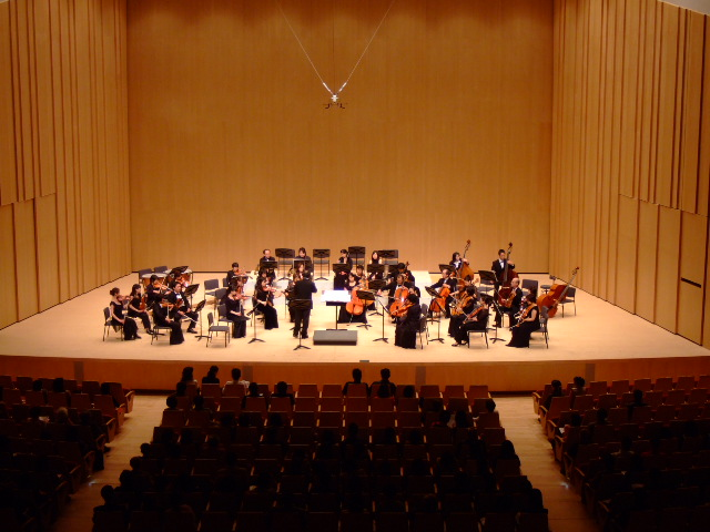 三原市芸術文化センター（ポポロ）のステージ。舞台上のオーケストラは三原室内管弦楽団